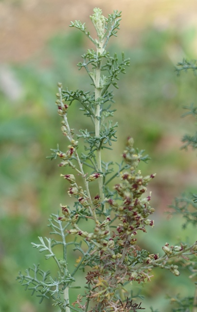 Artemisia barrelieri